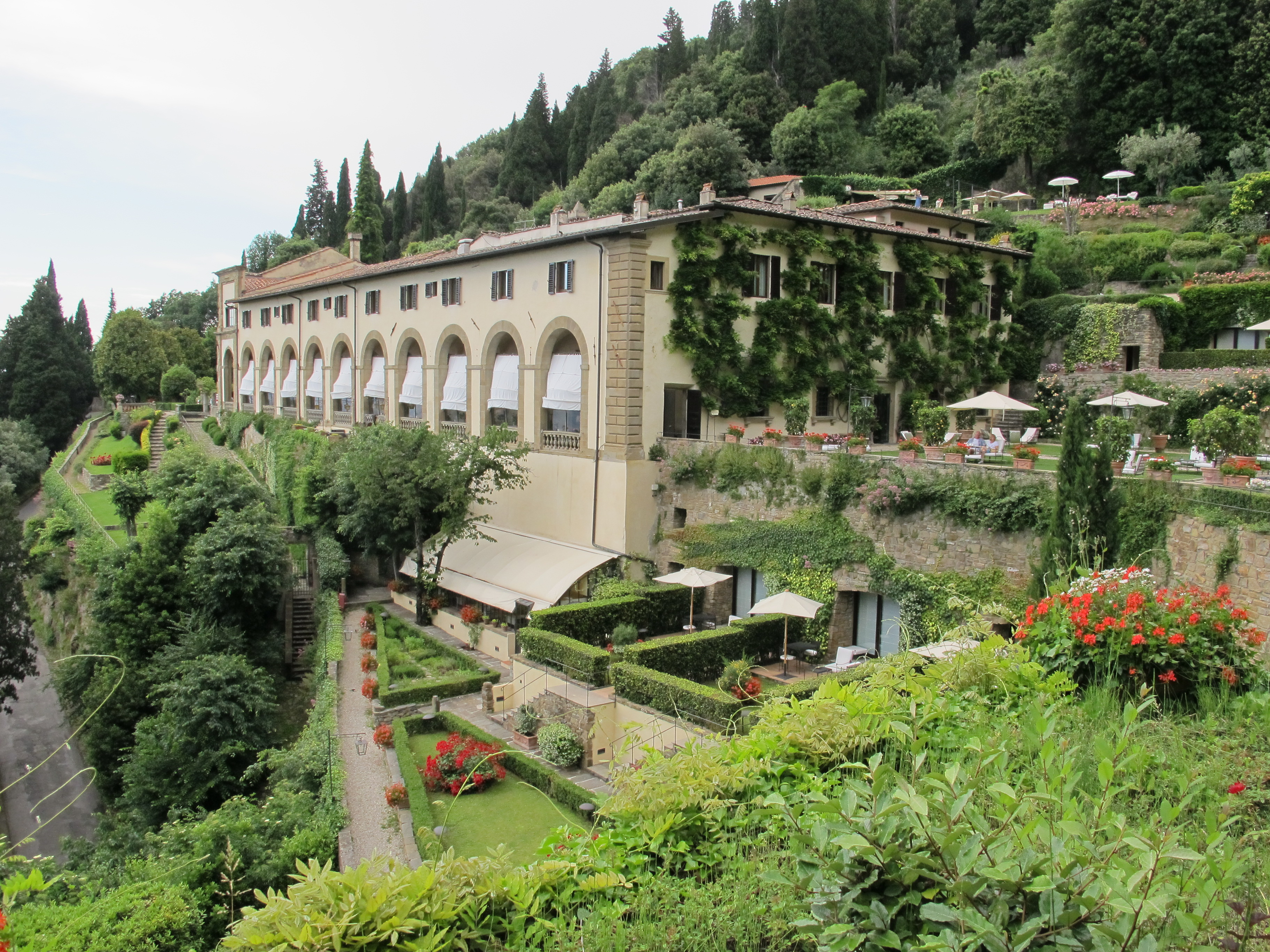 Villa san michele, fiesole, 02.1